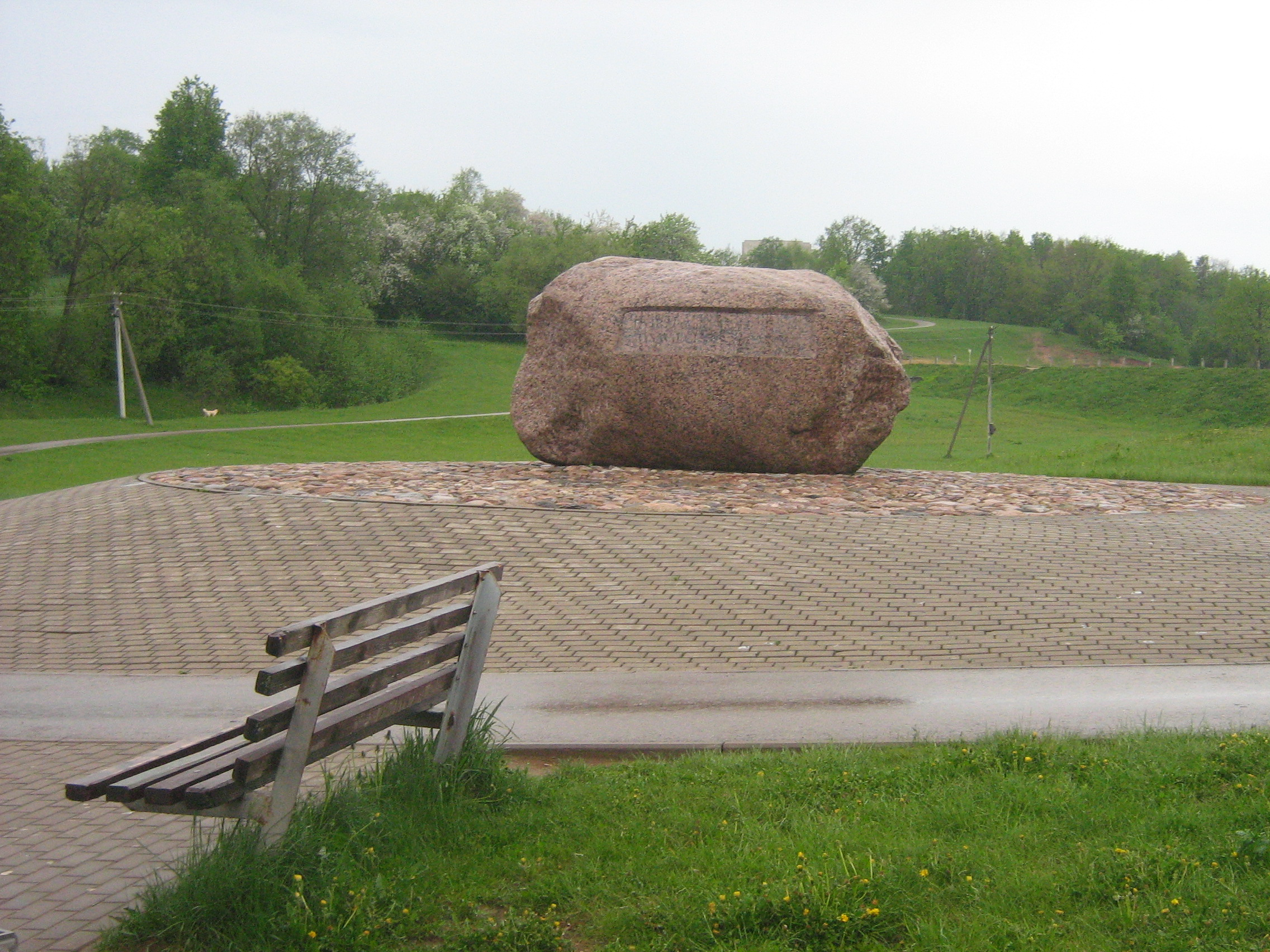 Achemos dviračių takų monumentinis akmuo